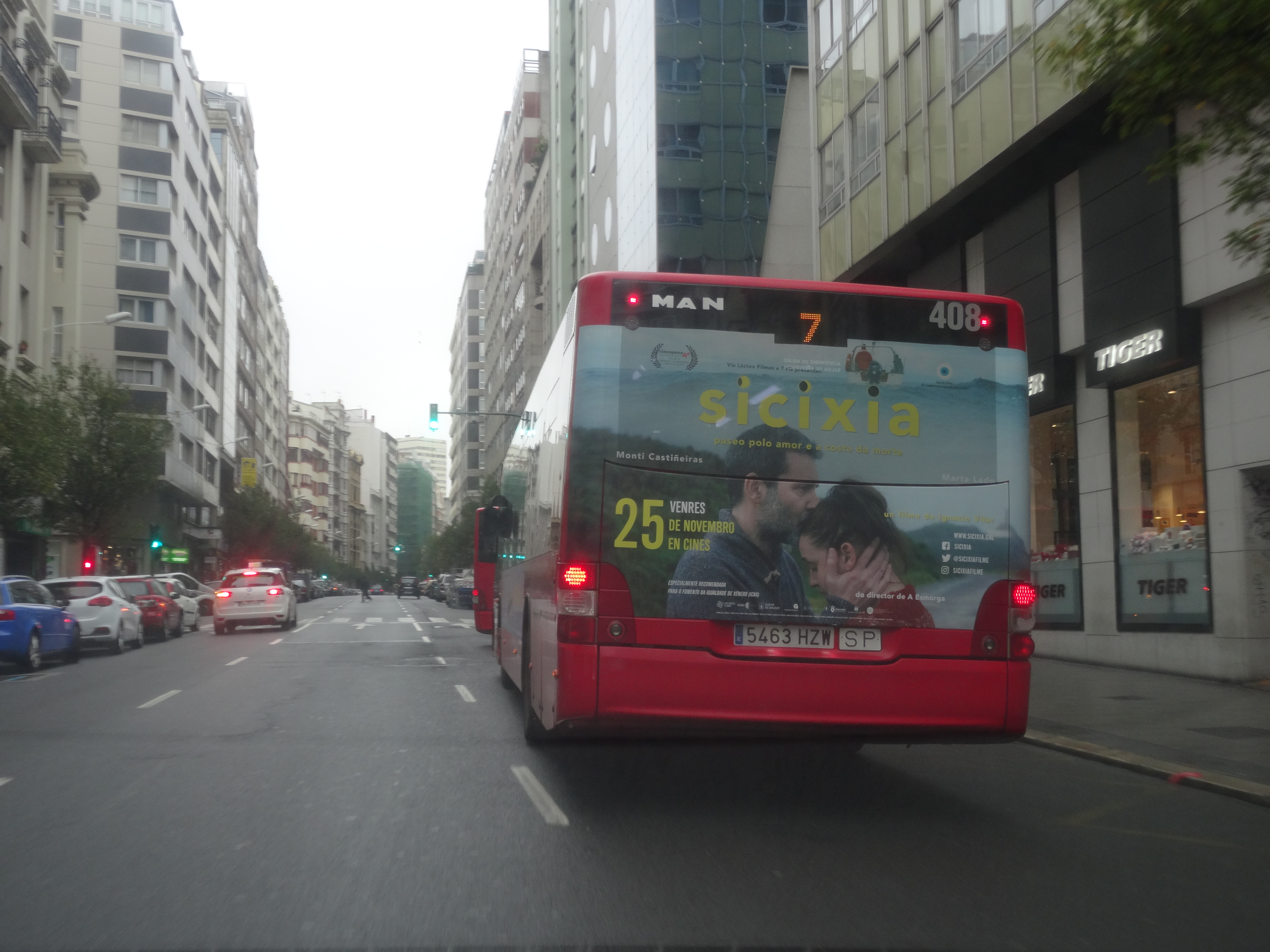 Ver nome.